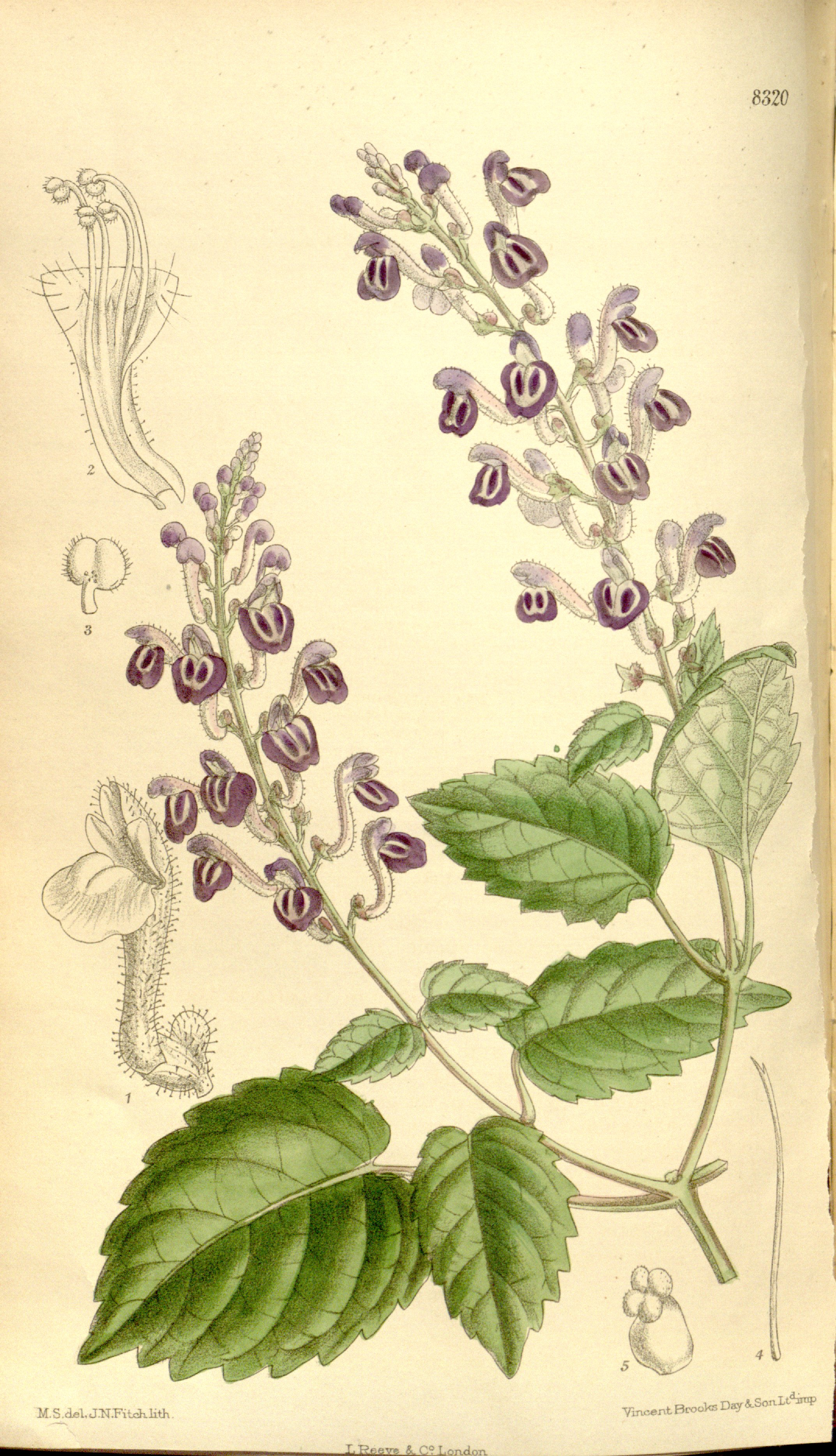 Scutellaria violacea, Lamiaceae